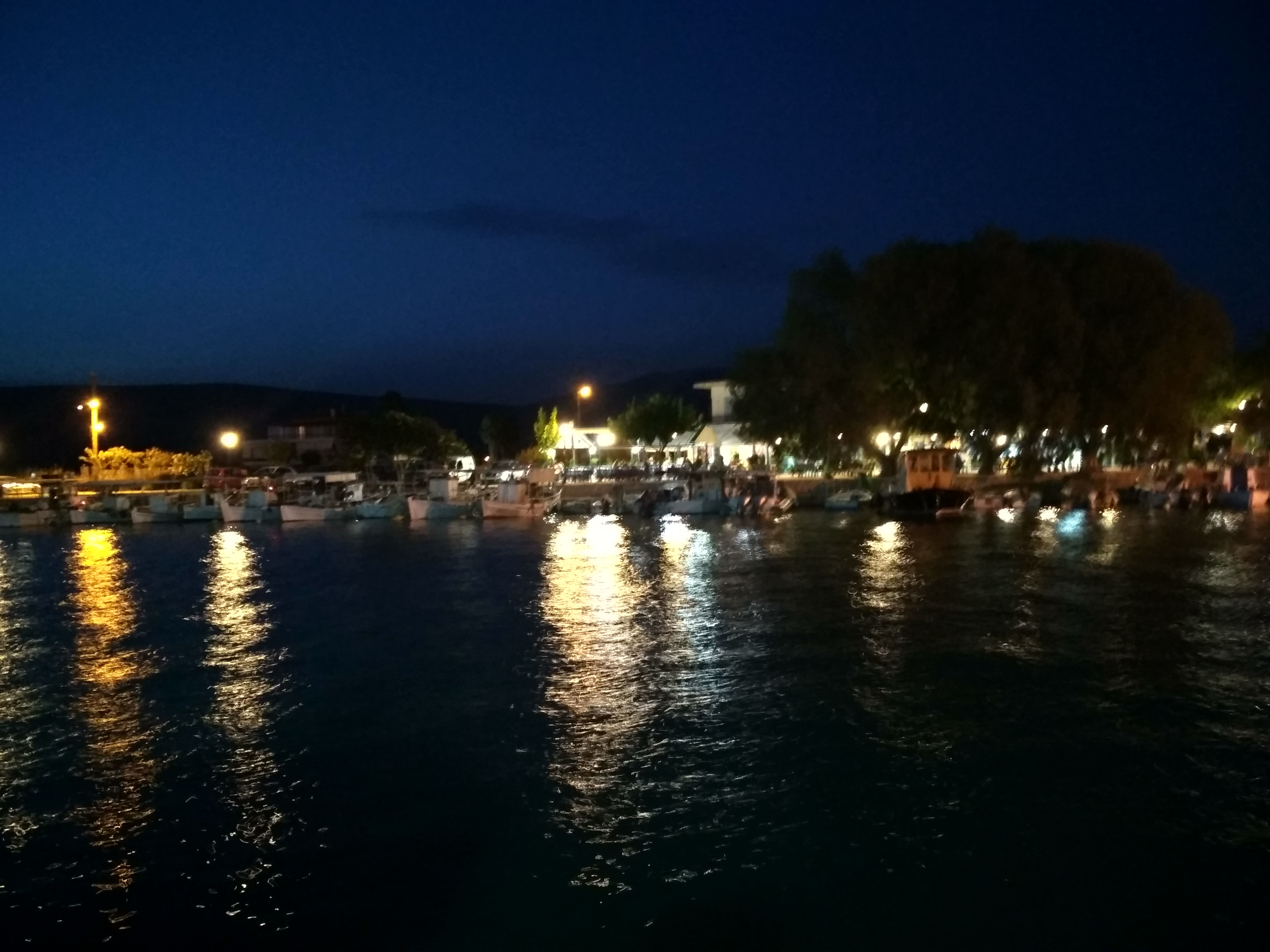 Το Λιμάνι των Ιρίων Αργολίδας το καλοκαίρι του 2018.